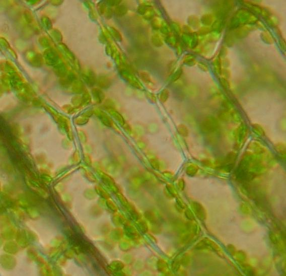 Cellules_d'Elodée